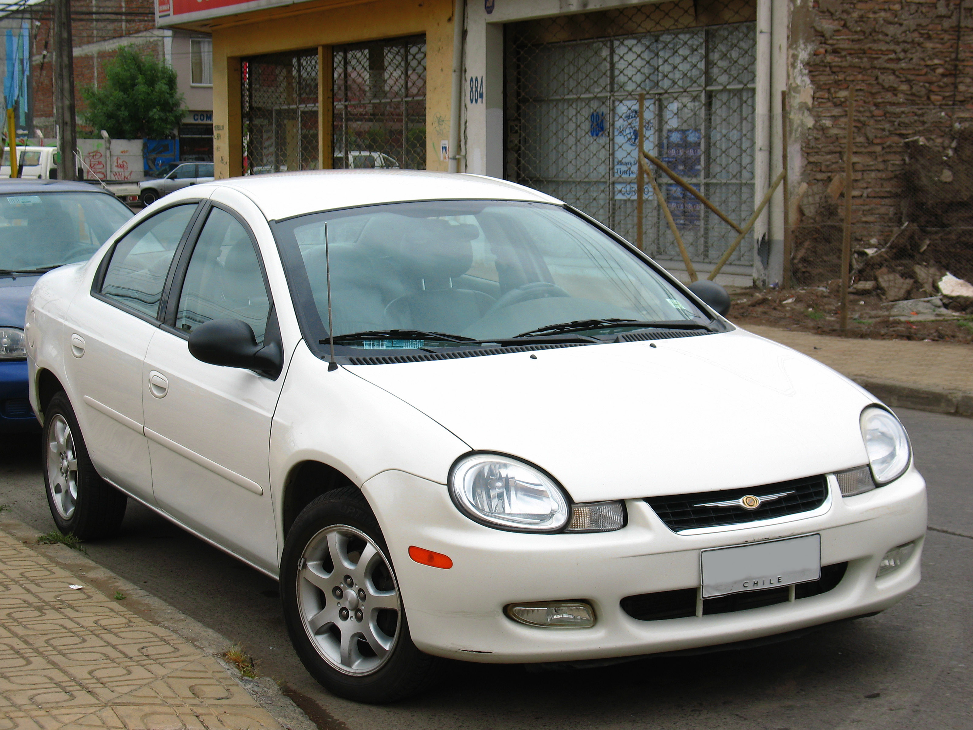 Dodge Neon 2.0i LX 2003